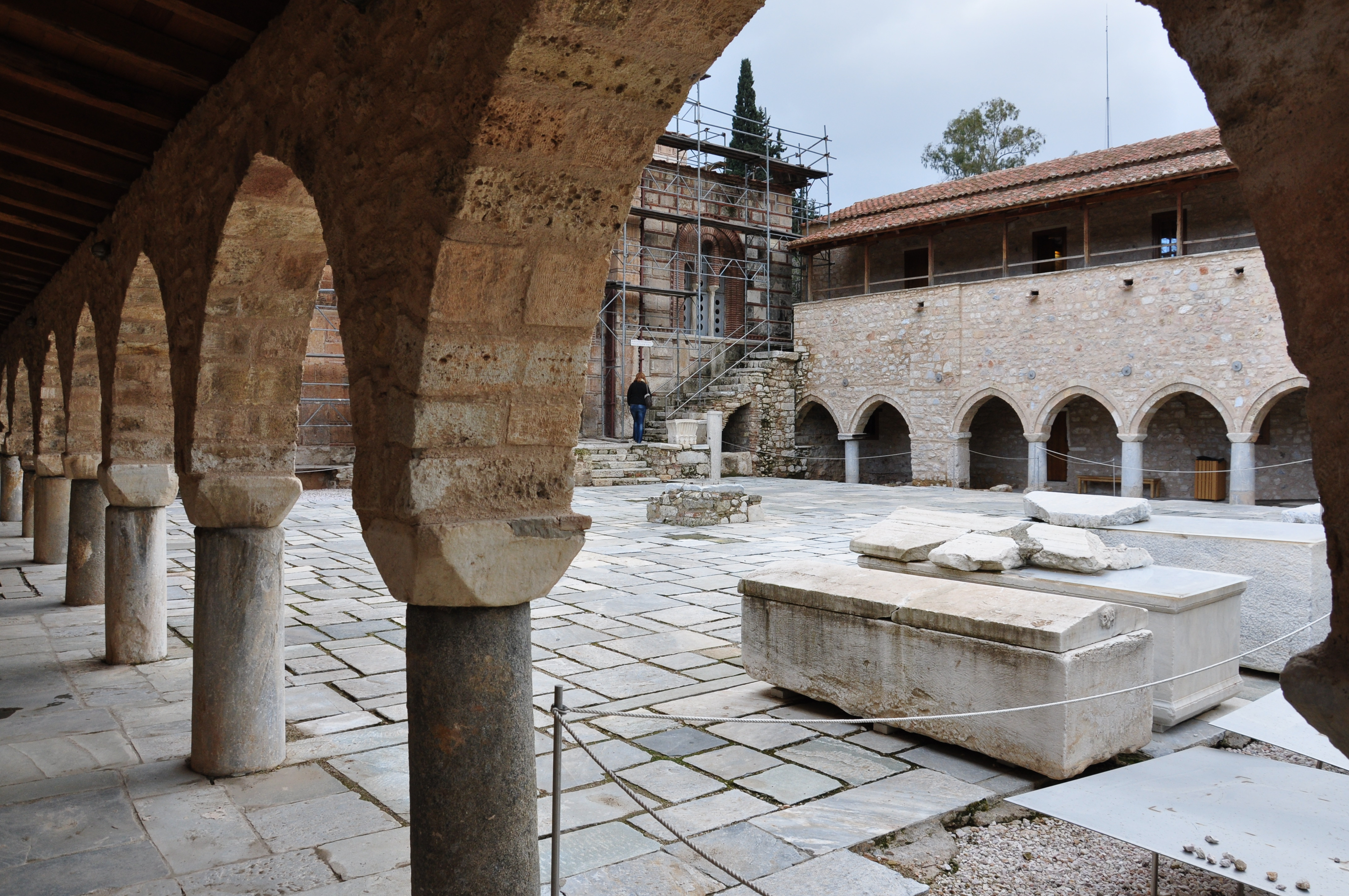 Dafni, obrzeża Aten. Gotyckie krużganki, pozostałe po obszernej niegdyś bryle klasztoru Bizantyńczyków i Cystersów.